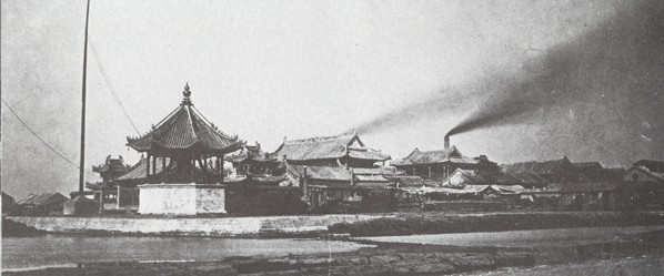 1890年代佚名拍摄的另一个角度的海光寺和机器局全景，近处的即西洋钟